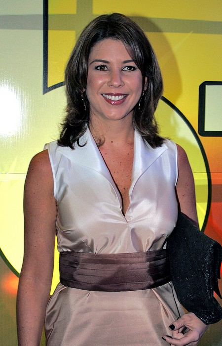 Foto da diretora geral do SBT , Daniela Beyruti